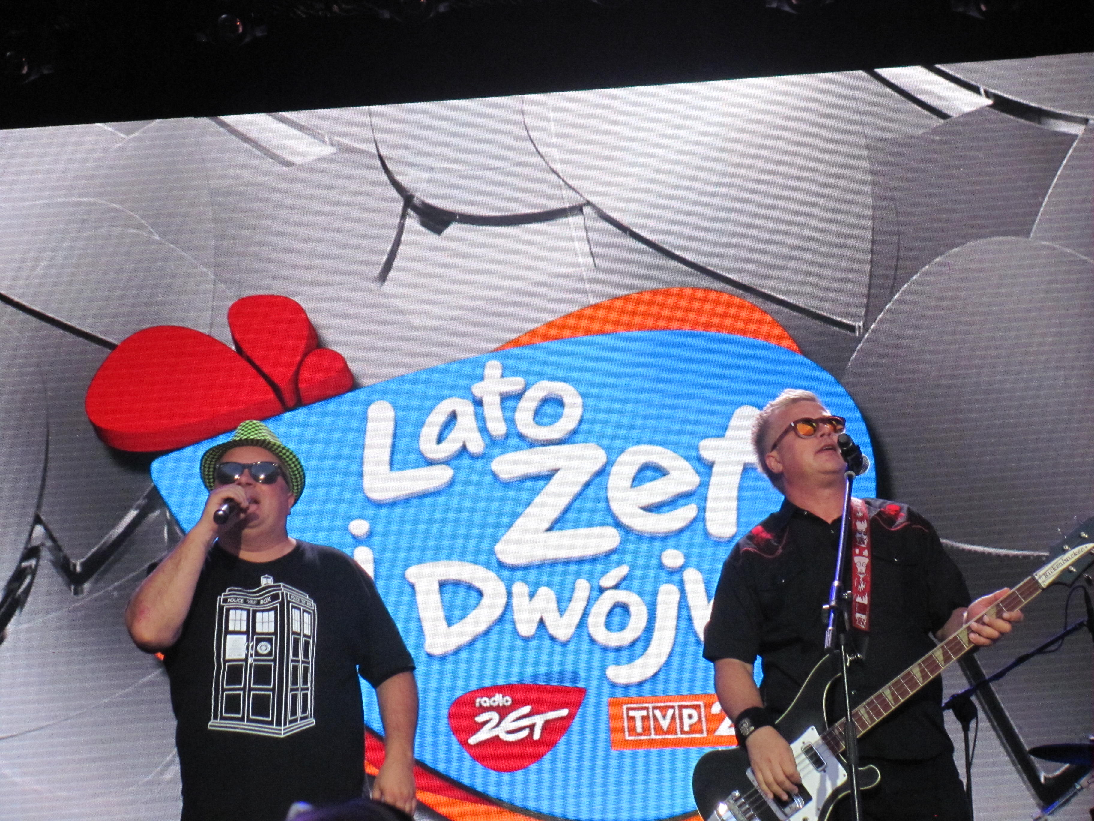 Koncert Lato Zet i Dwojki 2014 w Toruniu